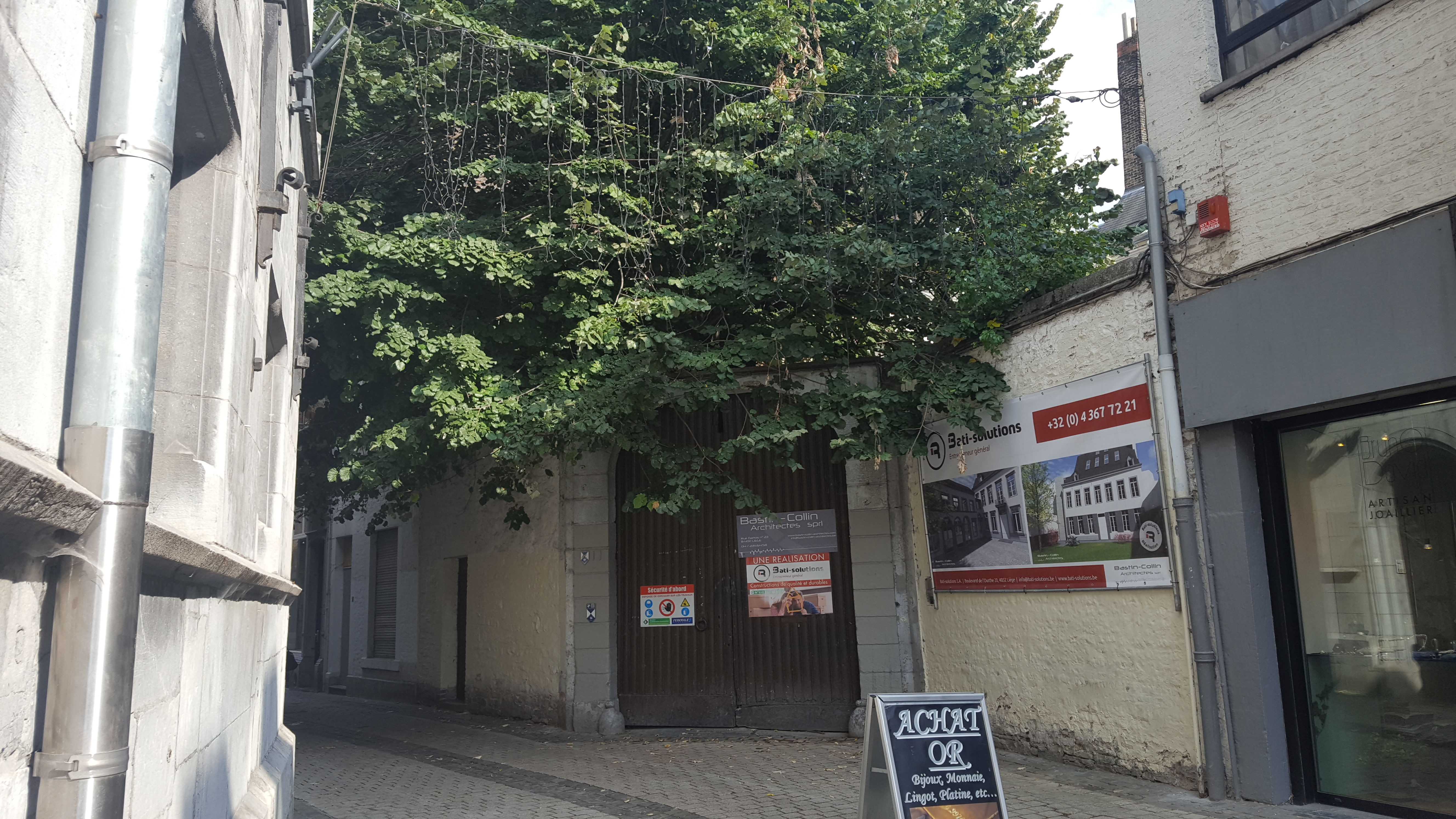 rue Bonne Fortune 9, Liège, Belgique